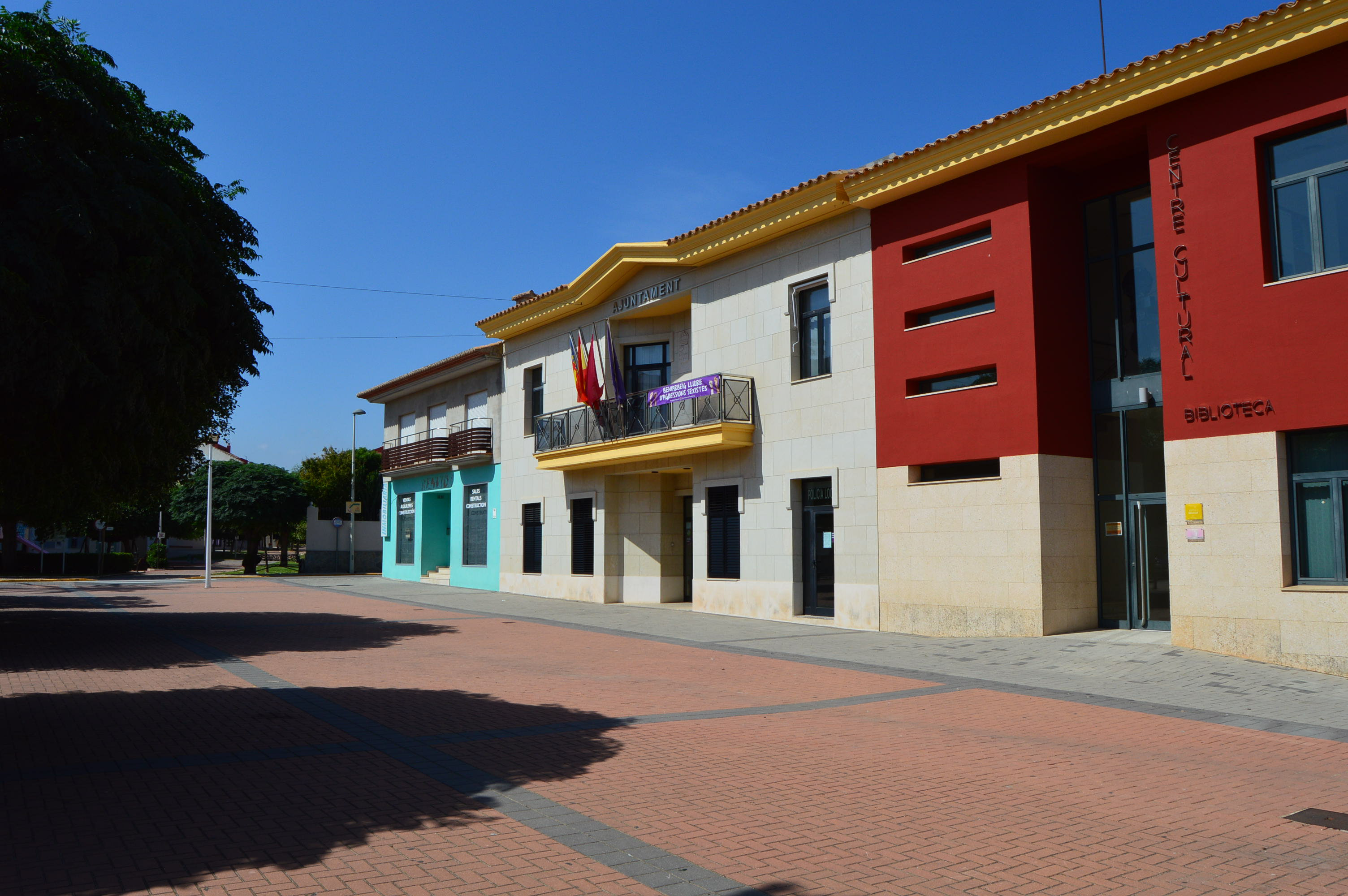 Vista de l'Ajuntament i del Centre Cultural que alberga la Biblioteca Municipal